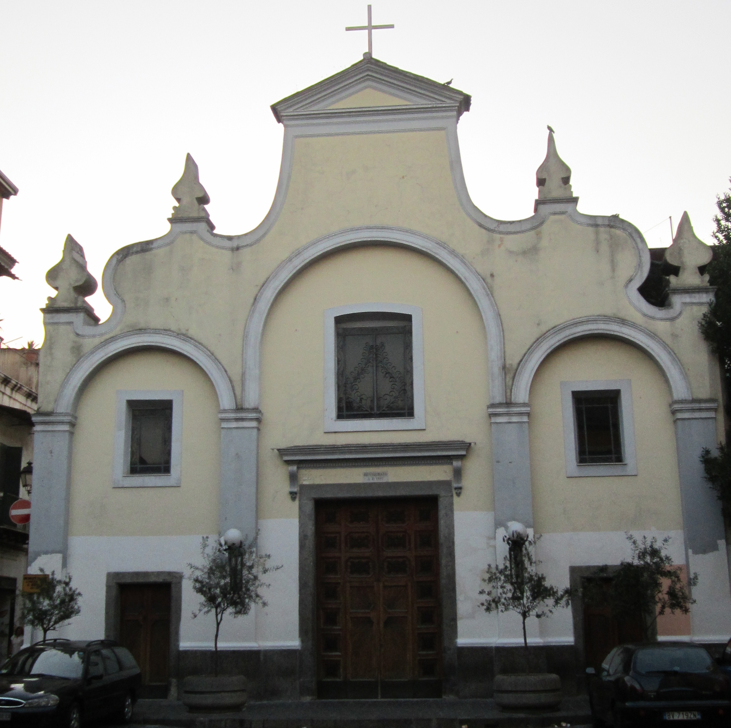 Opera propria